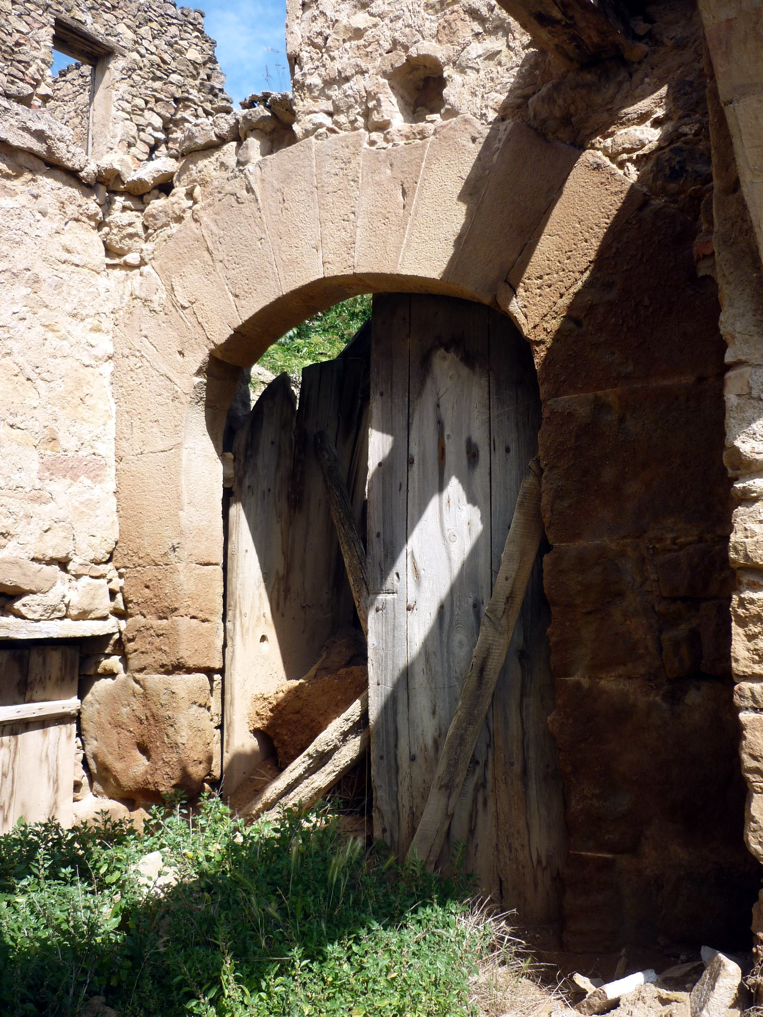 Runes del Castell de Pampa (Castellar de la Ribera)